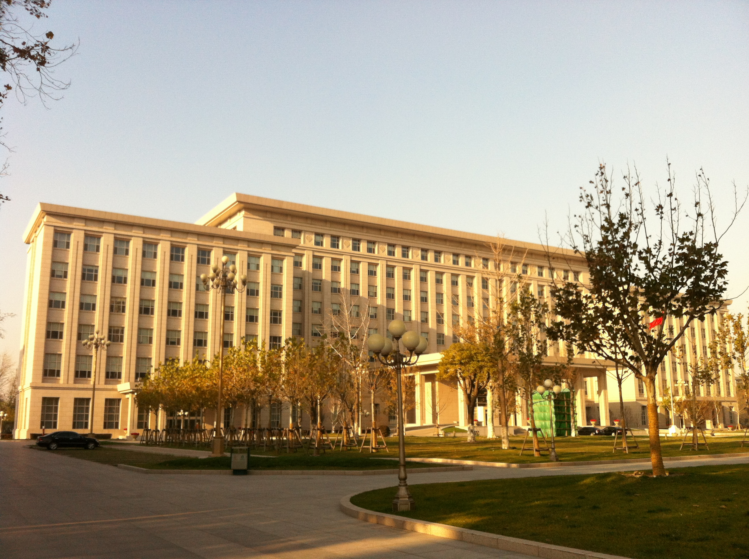 中文（中国大陆）: 天津市人民政府全景